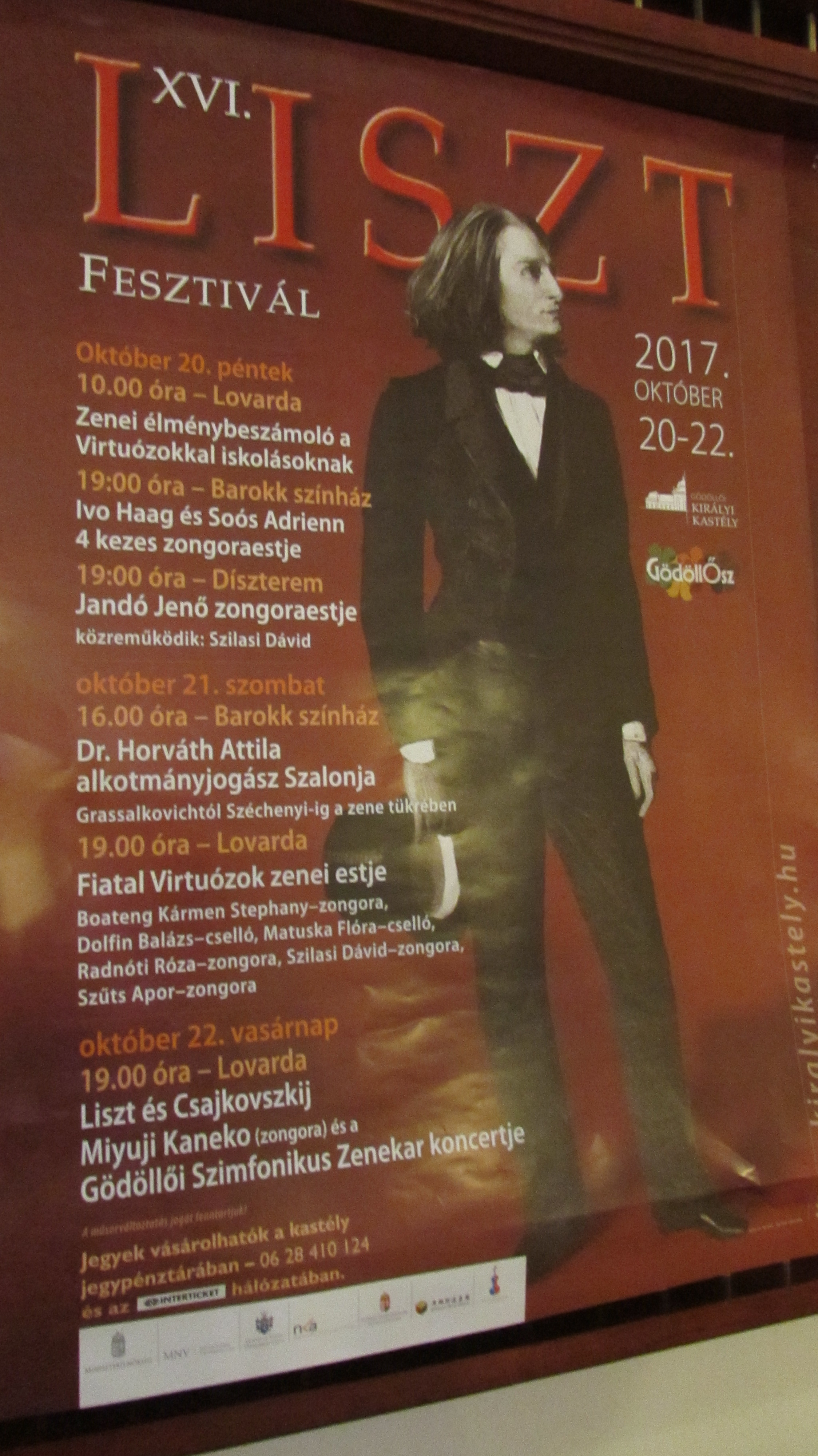 Gödöllö Schloss Konzert Oktober 2017